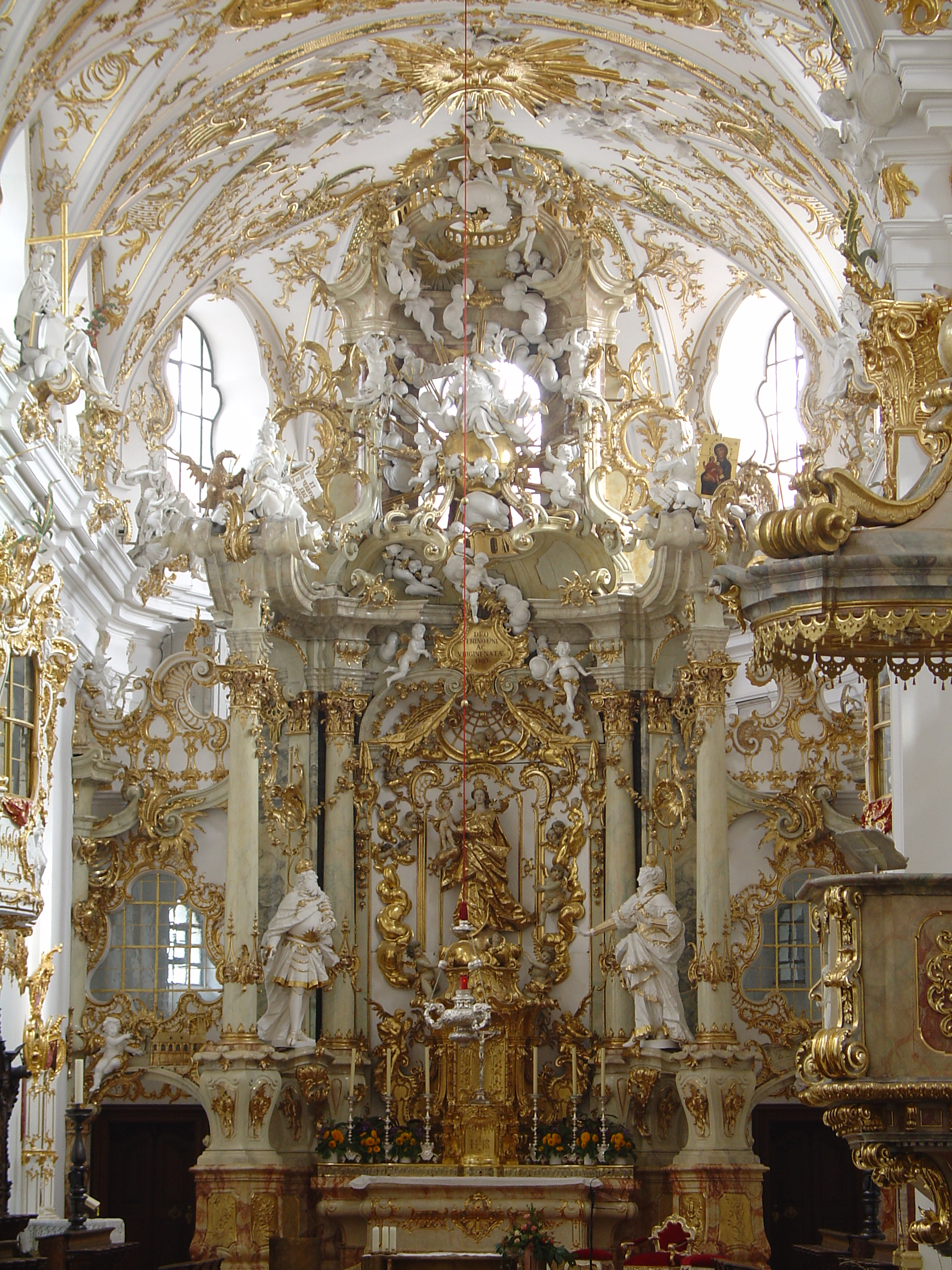 Alte Kapelle in Regensburg